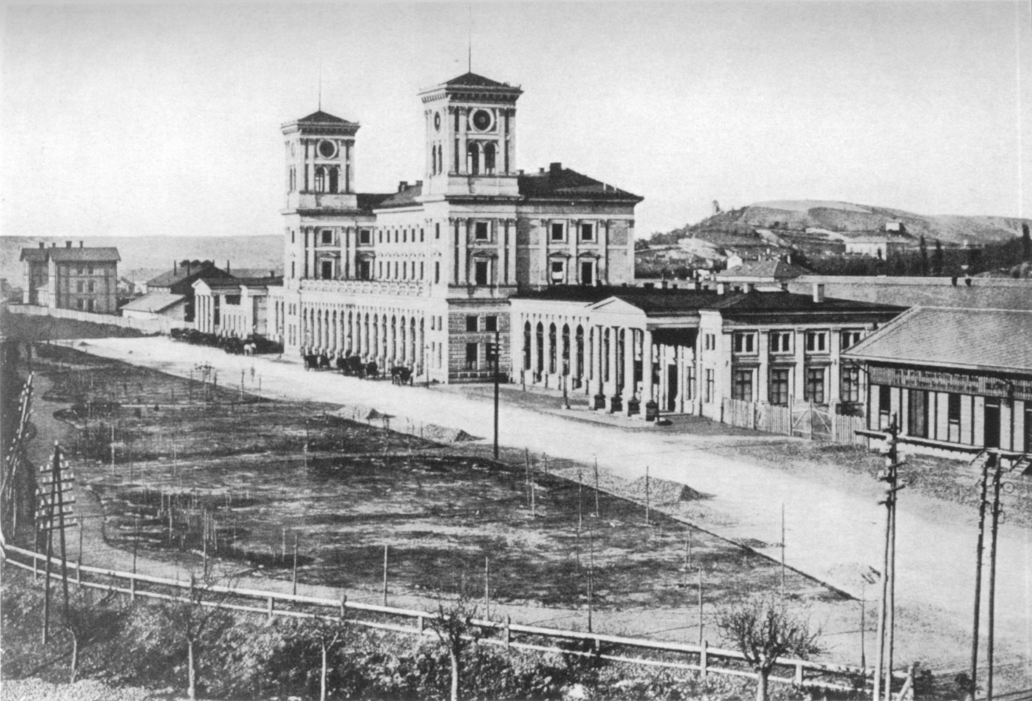 Novorenesanční budova Hlavního nádraží (tehdy Nádraží císaře Františka Josefa I.)